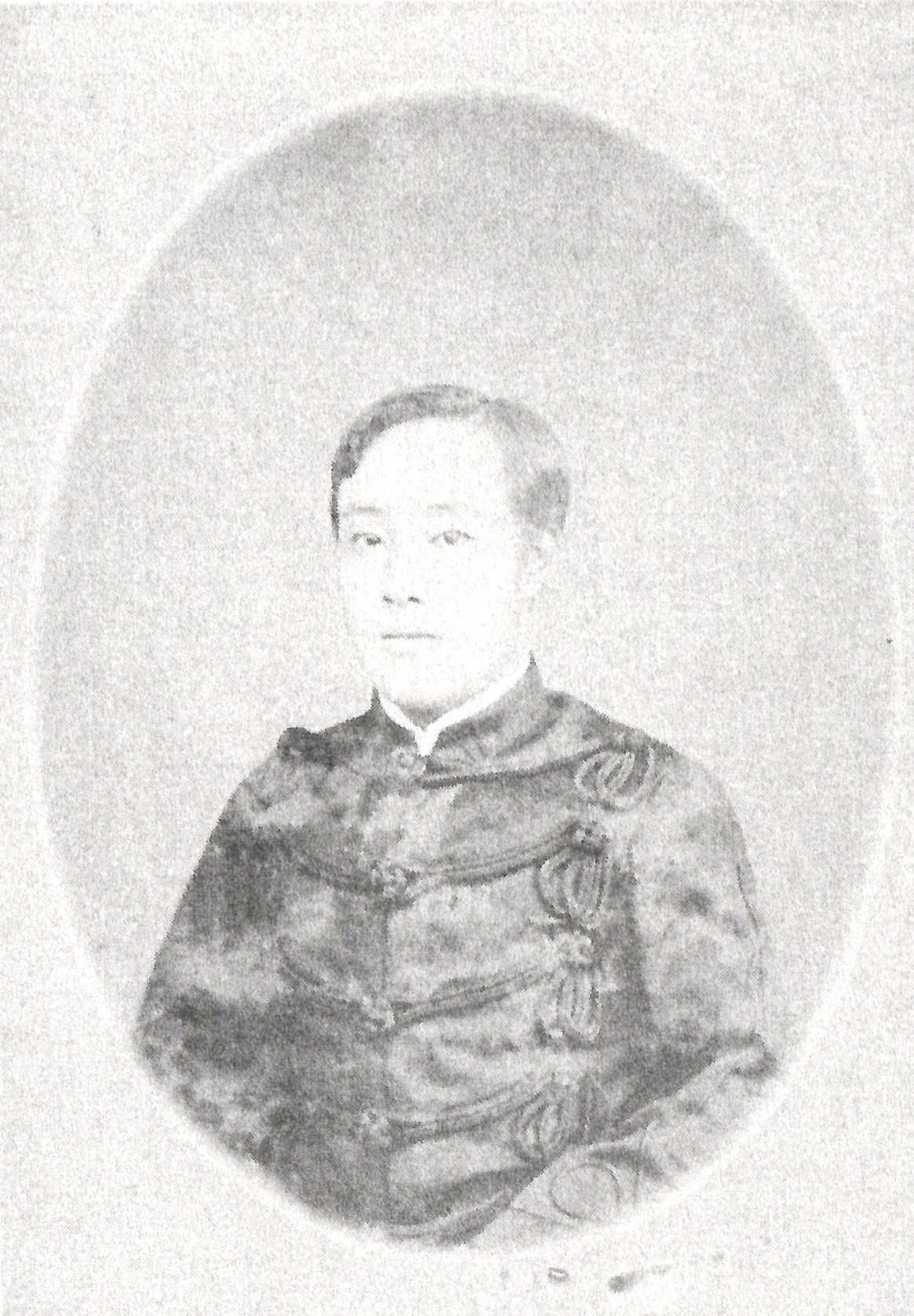 勧修寺顕允の肖像写真。